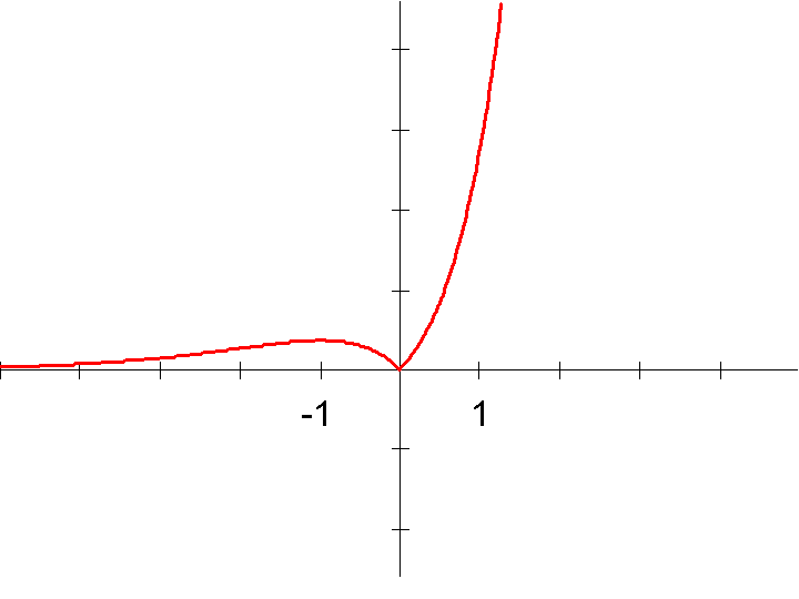 f(x) = exabs(x)